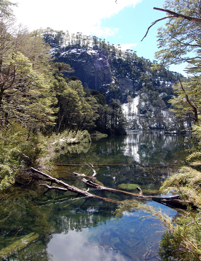 Lago Chico - Parque Nacional Huerquehue - Pucón - Chile